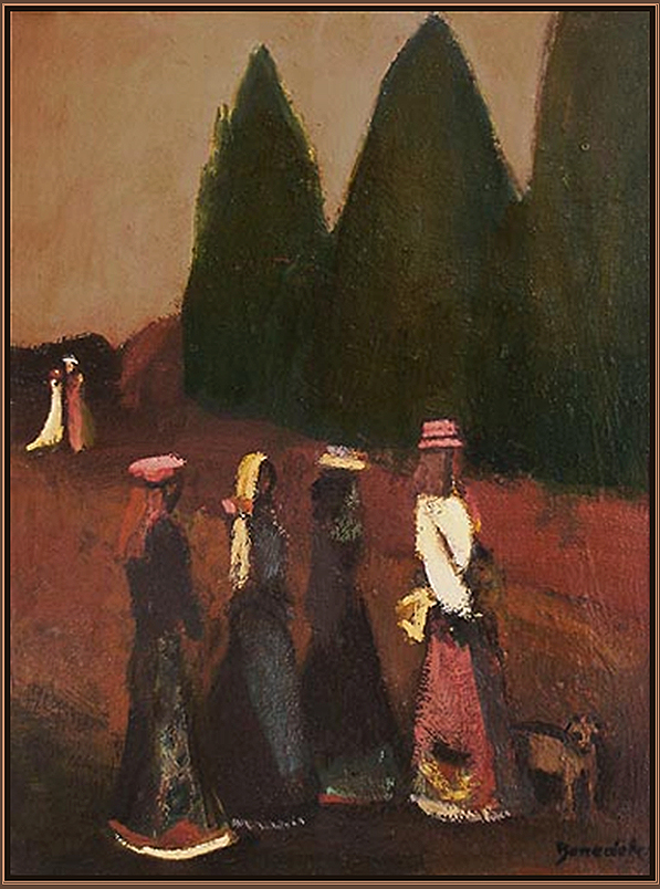 Idősebb Benedek Jenő (Kecskemét, 1906. január 16. – Budapest, 1987. július 19.) magyar festő Esti séta című olajfestménye, 1959 - 80x60 cm